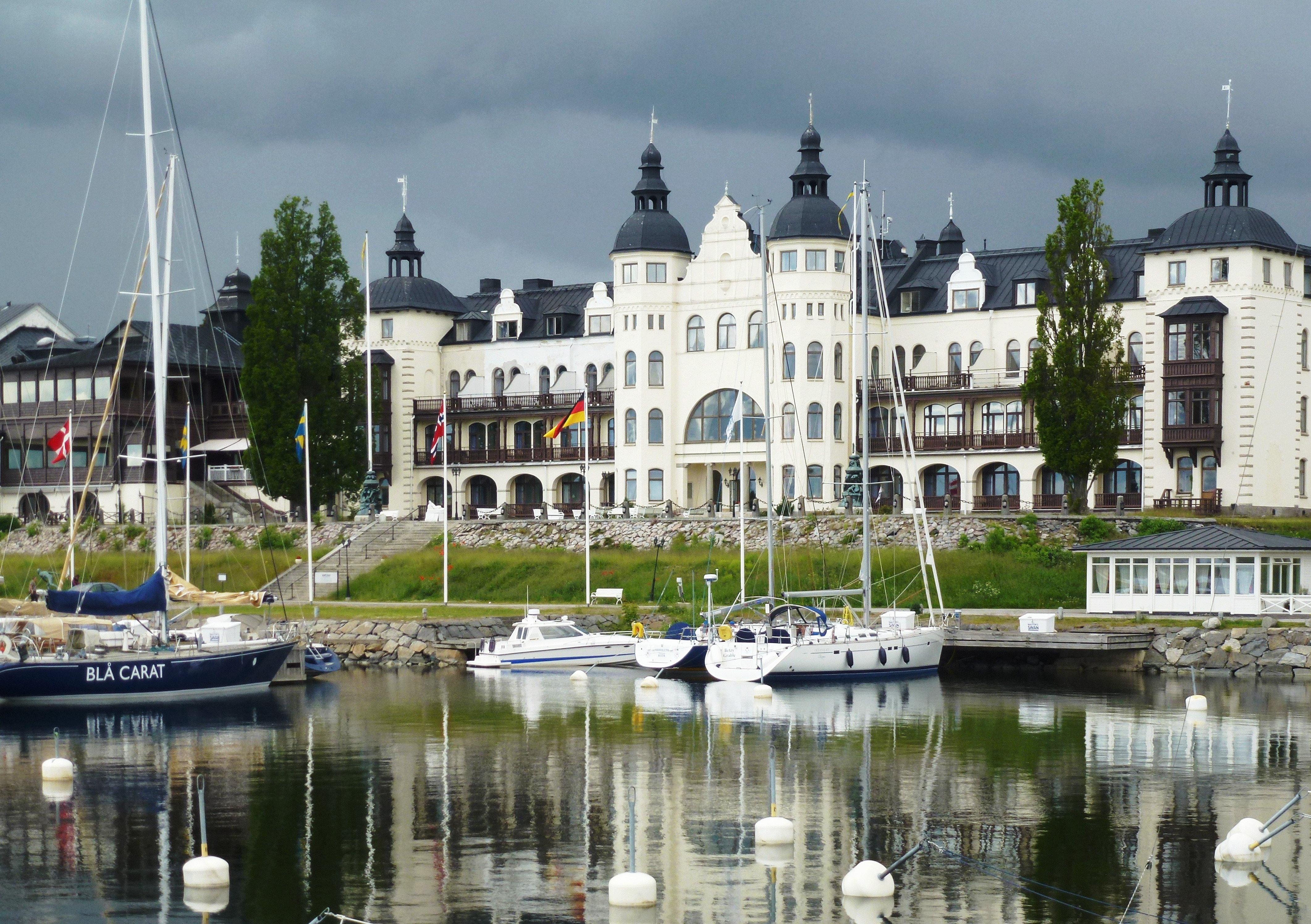 Grand Hotel, Saltsjöbaden